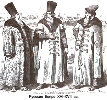 Russische Bojaren. Public Domain oder